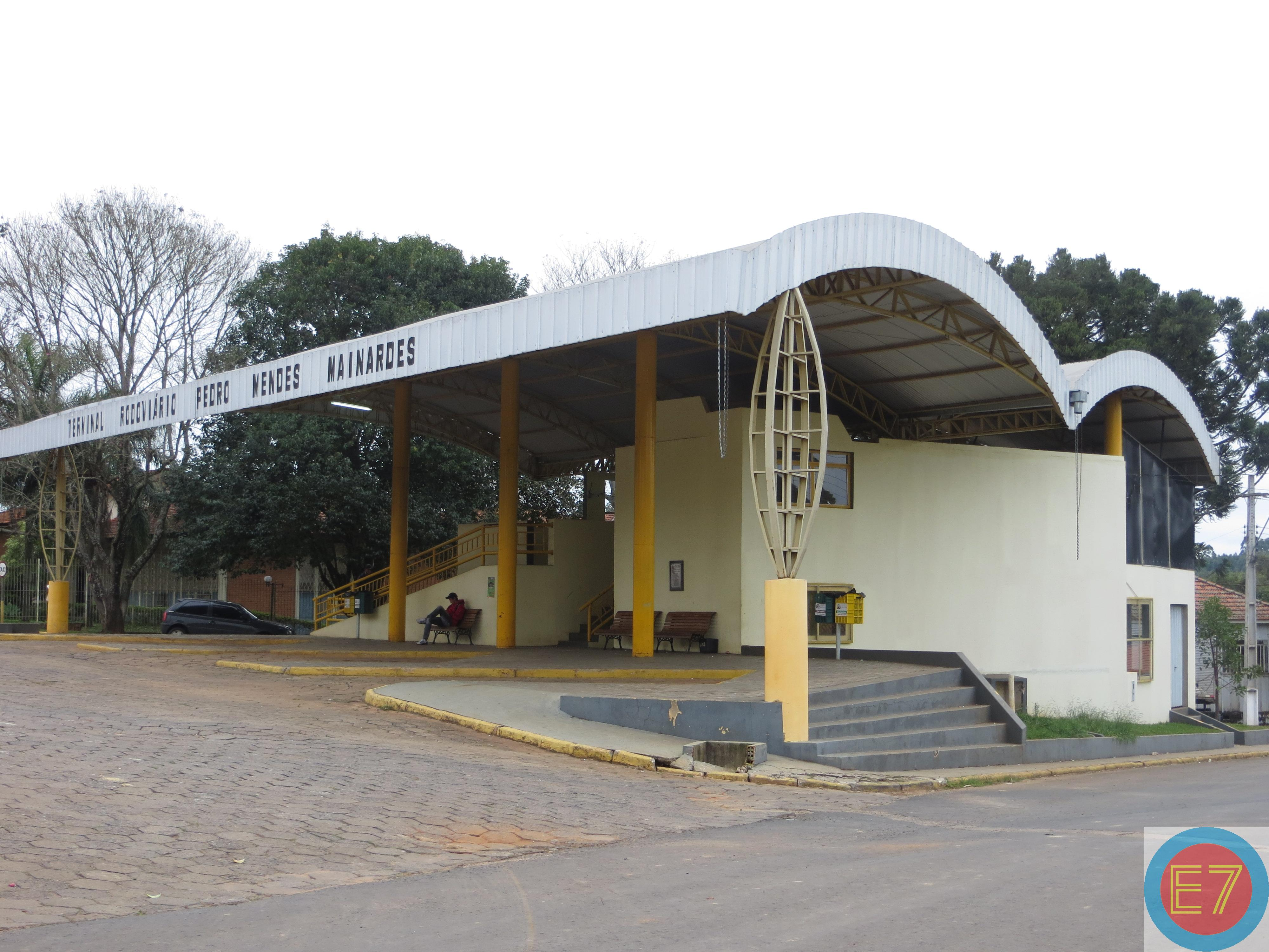 Terminal Rodoviário Pedro Mendes Mairnardes, em Curiúva, Estado do Paraná, Brasil.